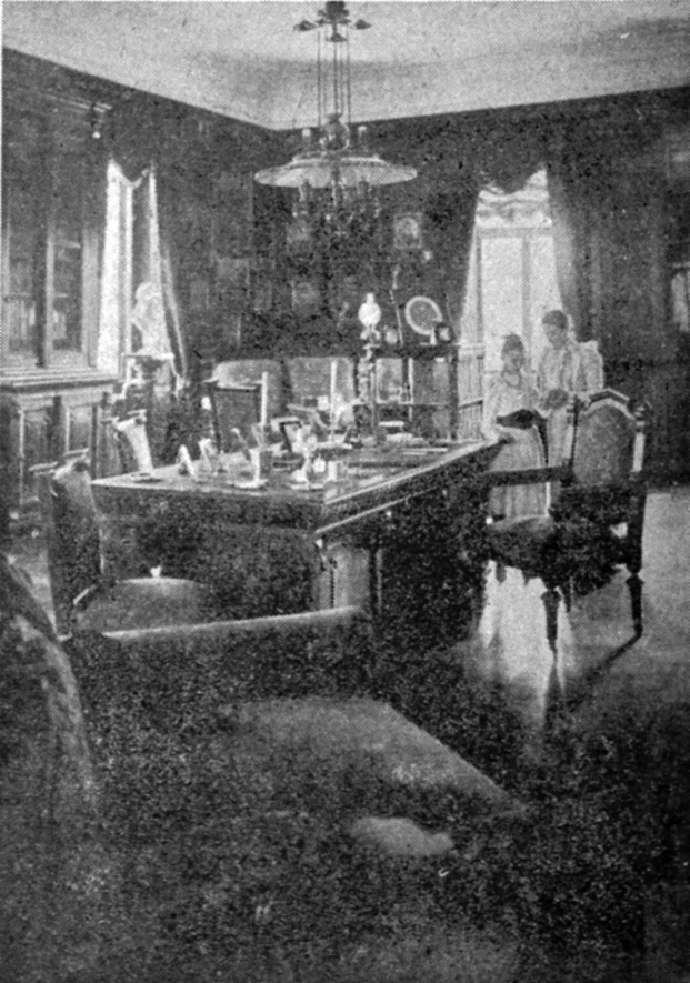 Беларуская (тарашкевіца): Навасёлкі (Navasiołki), сядзіба Чапскіх (Čapski)